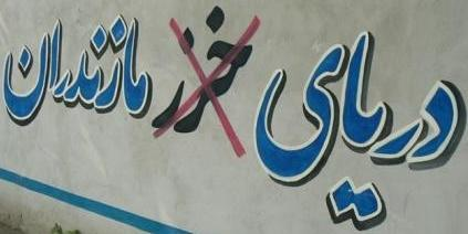 مازِرونی: اینتا عکس ره یَتّا پلاژ دله فرح آباد میون بَییتمه.